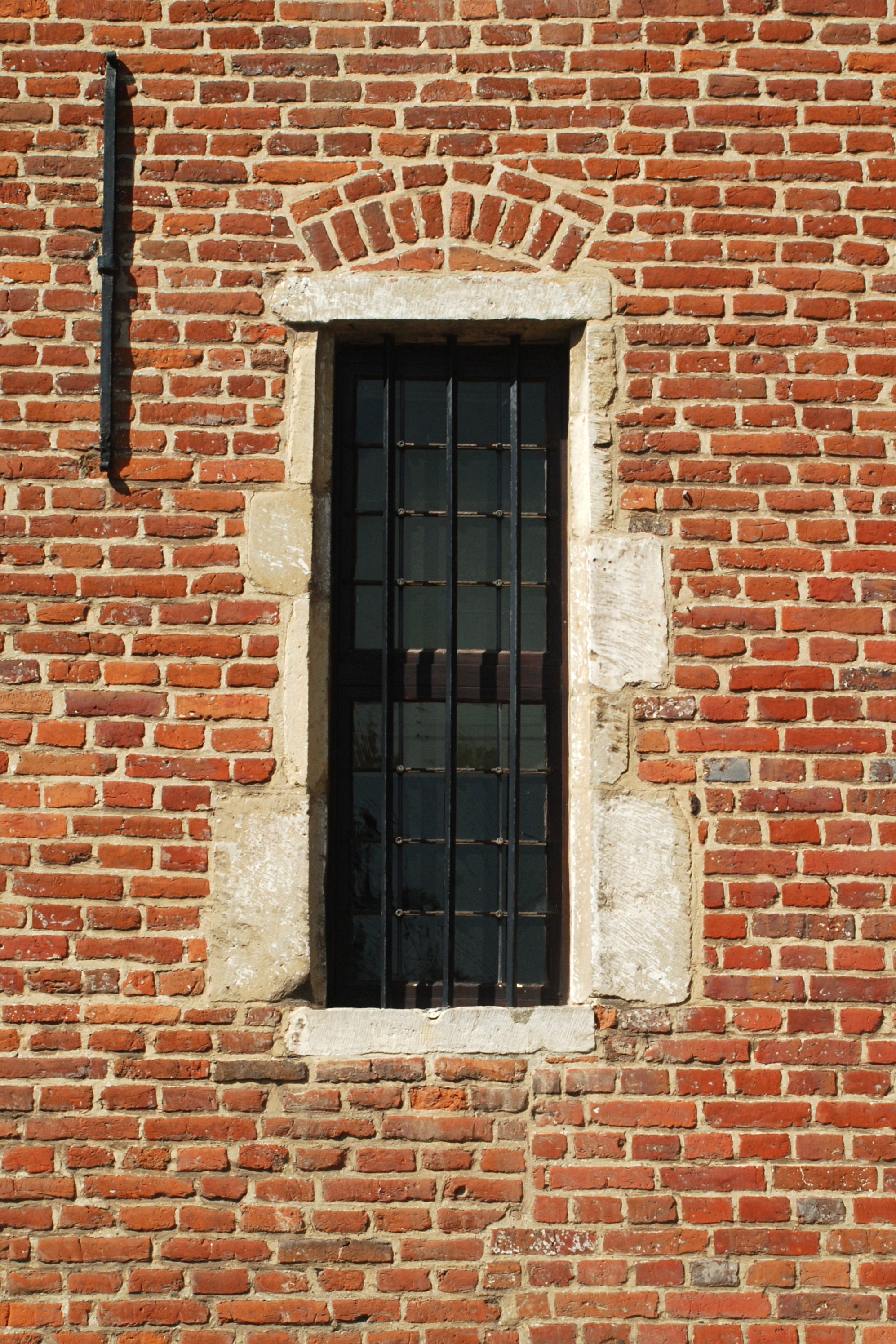 Belgium - Leuven - Groot Begijnhof - Middenstraat n° 14-15 - Faculty club